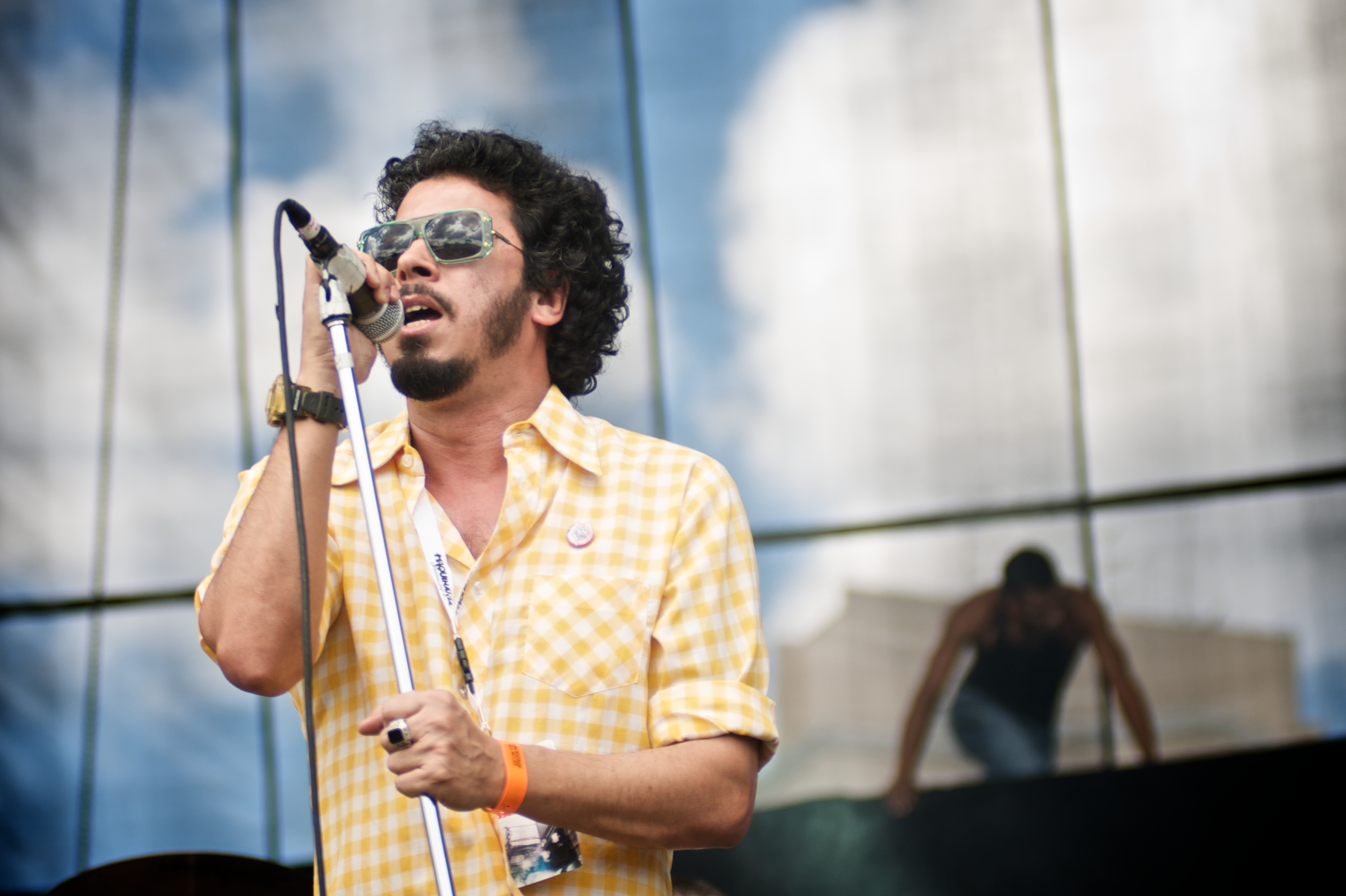 Primeiro dia de shows do Festival Maquinária a banda Nação Zumbi abriu o palco principal.